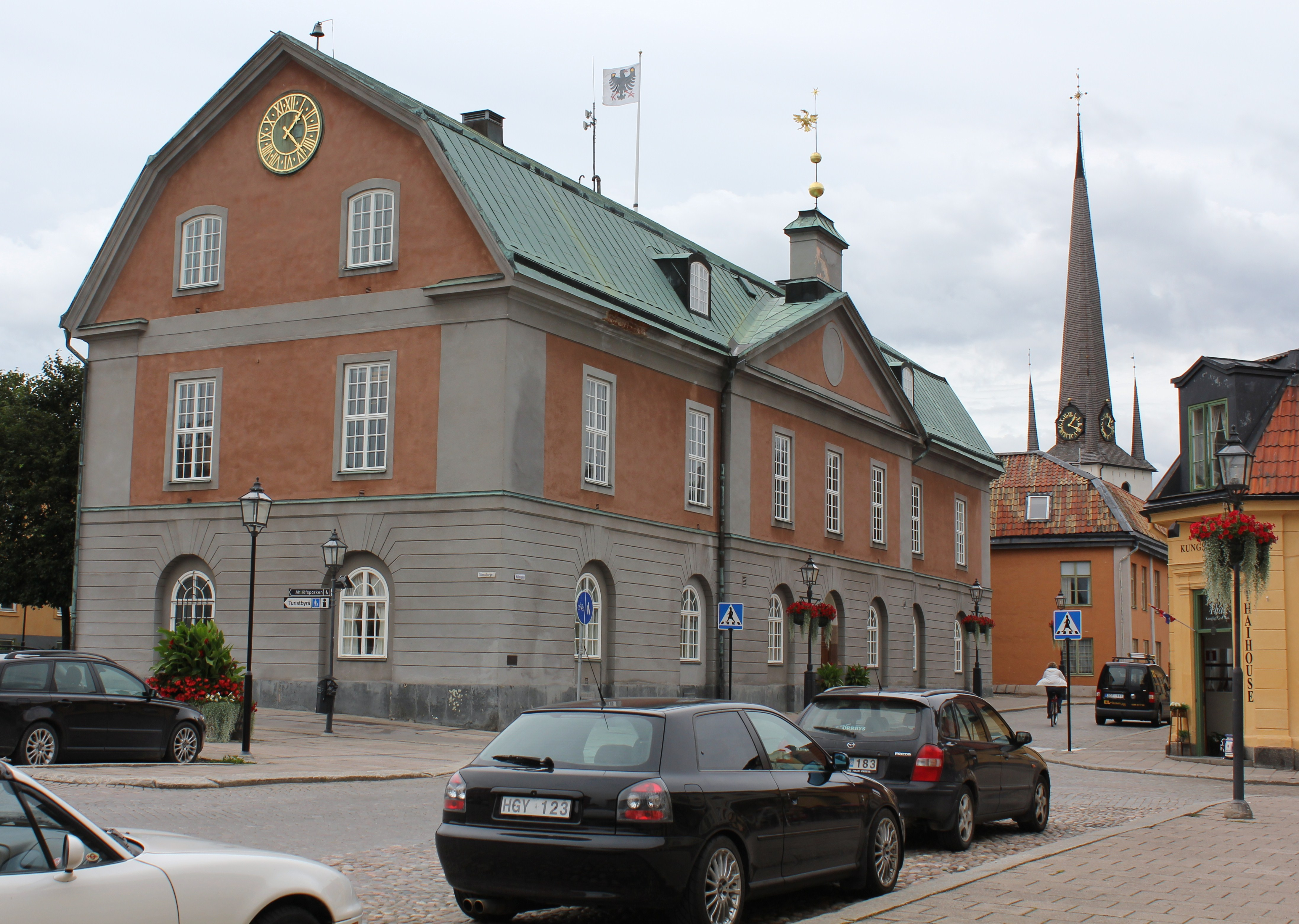 Arboga. Rådhuset, Stora torget.